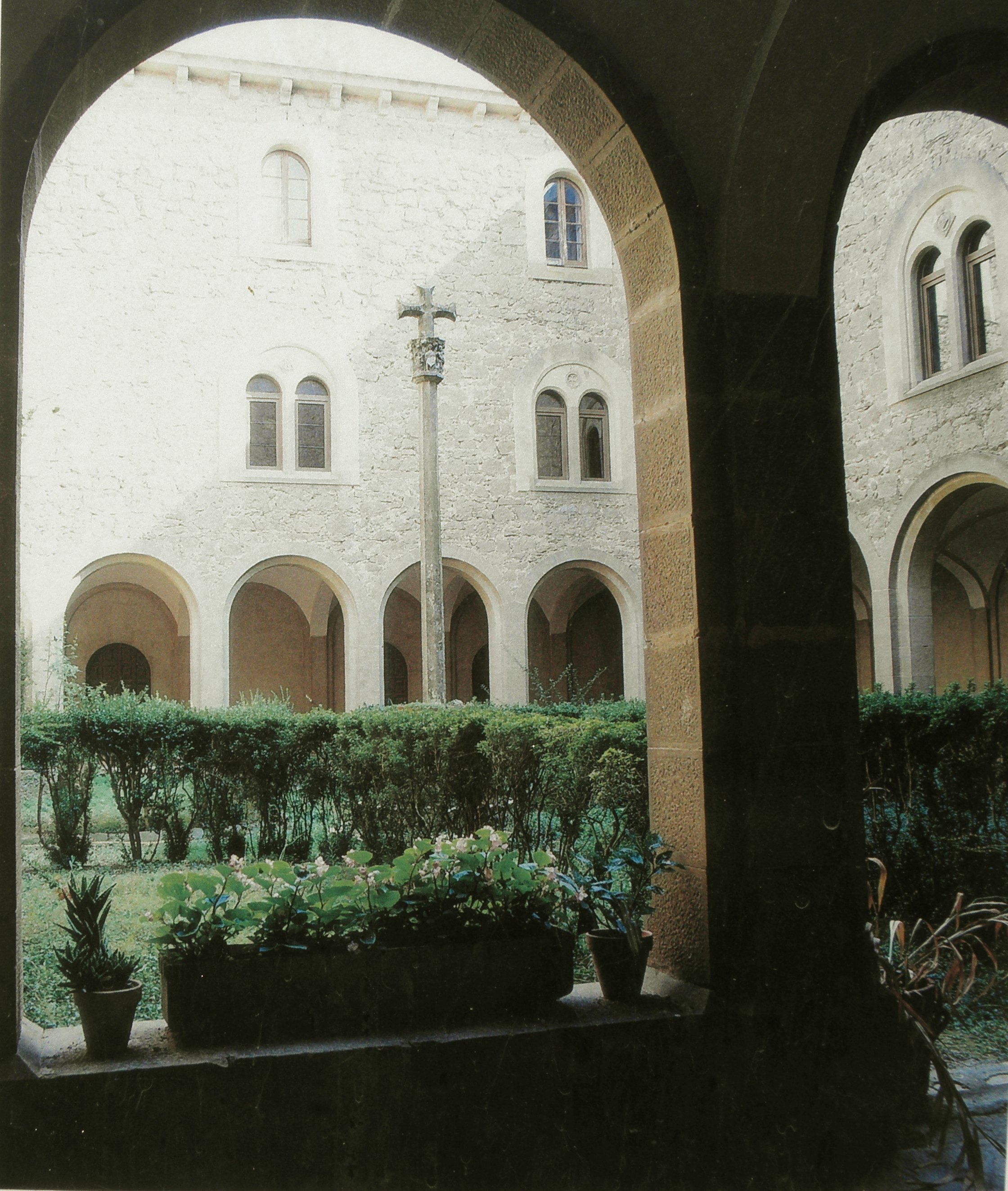 El claustre del monestir del Miracle (Riner, Solsonès).